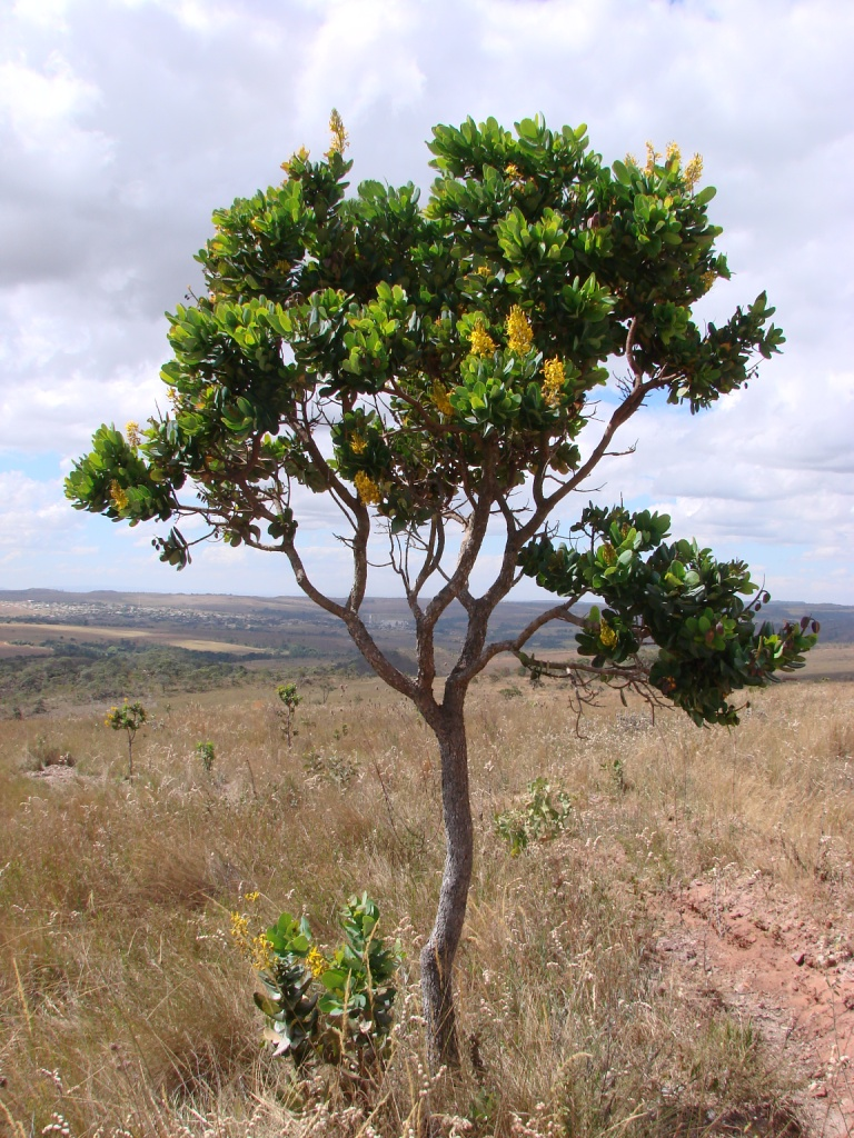 Vochysia elliptica - VOCHYSIACEAE Parque Estadual da Serra dos Pirineus - Pirenópolis - Goiás - Brasil.